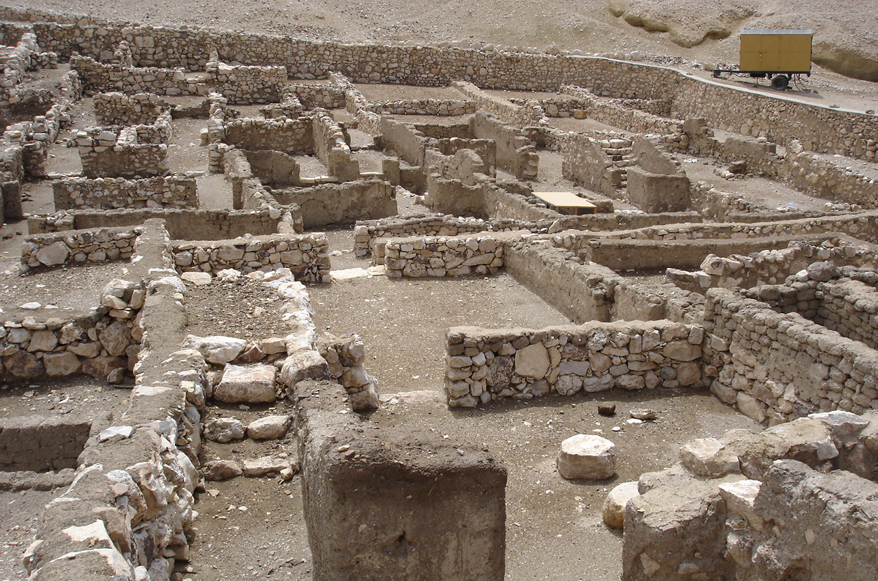 A falu házai Derj-el-Medinében (Luxor, Egyiptom)